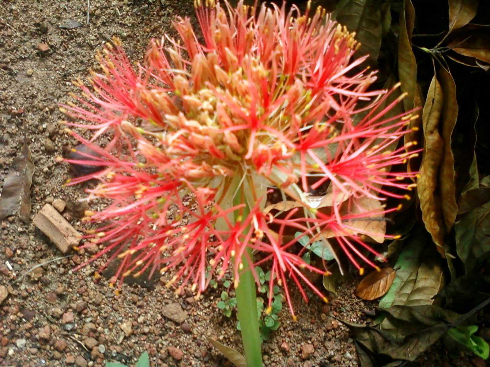 കുടമുല്ലപ്പൂവ് (ഫുട്ബോൾ ലില്ലി)(ബ്ലഡ്‌ ലില്ലി)